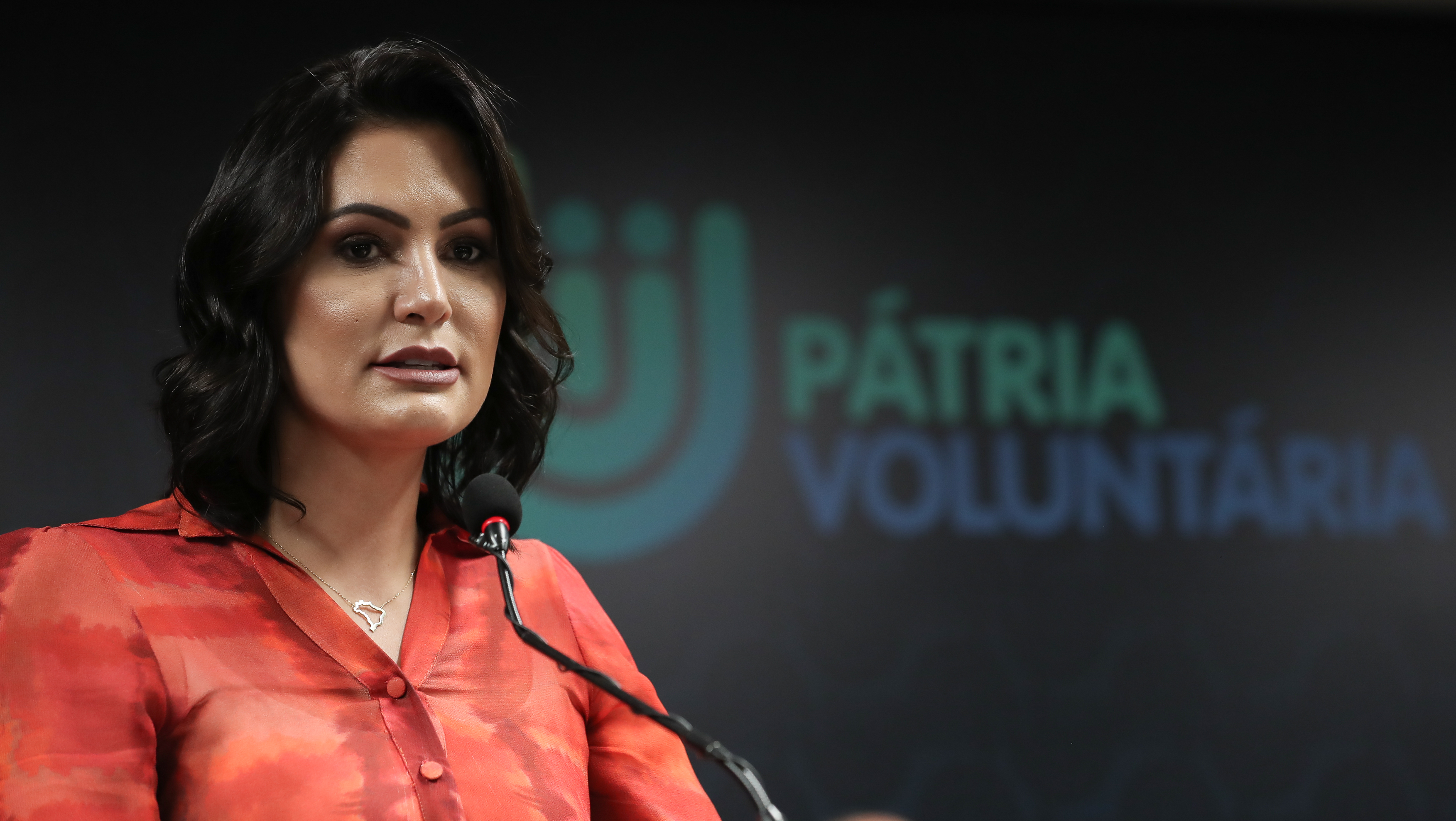 (Brasília - DF, 09/07/2019) Palavras da Senhora Michelle Bolsonaro, Presidente do Conselho Nacional de Incentivo ao voluntariado. Foto: Marcos Corrêa/PR